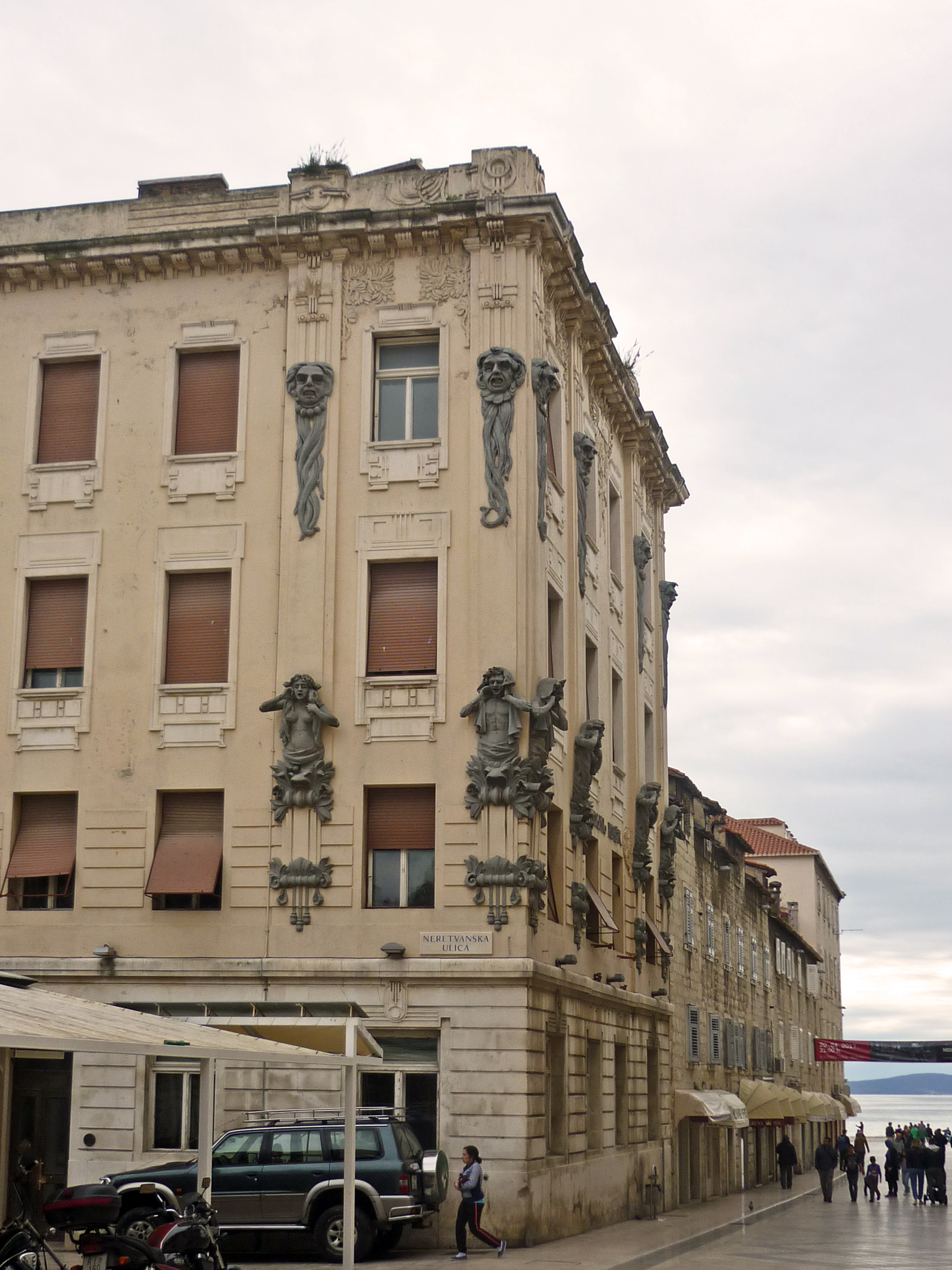 Marmontova-Straße in Split